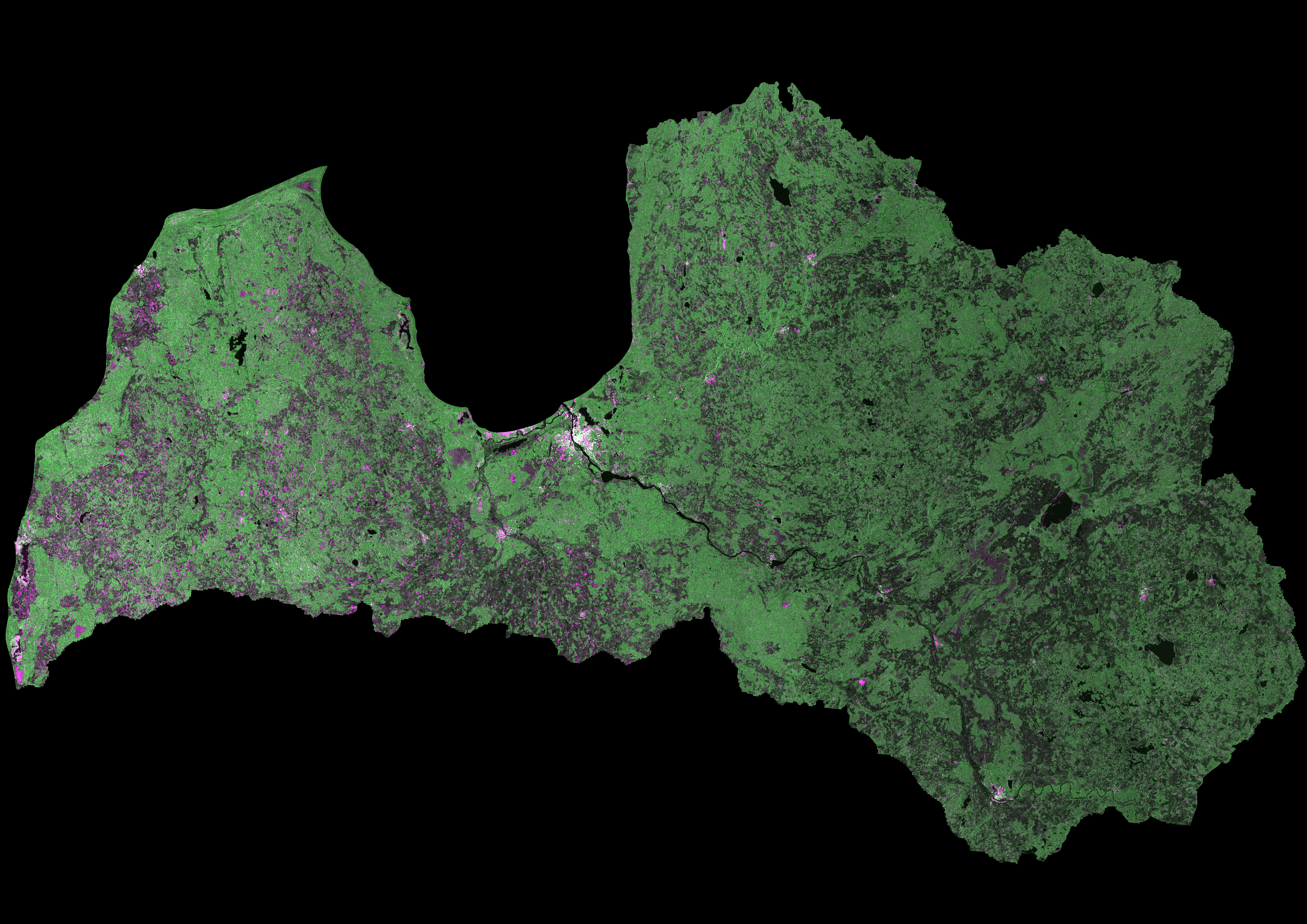 Latvijas teritorija Sentinel-1 SAR datu mozaīkā